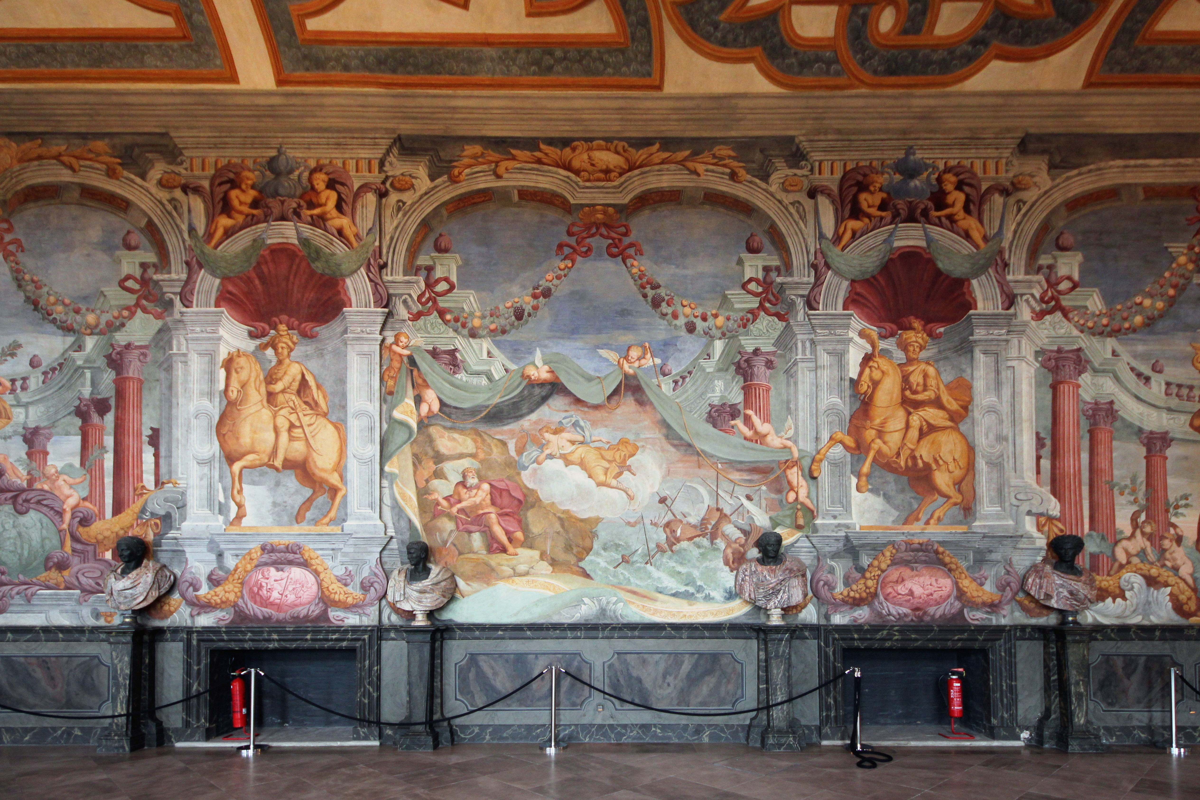 Ansicht aus dem Galeriegebäude im Großen Garten in Herrenhausen (Hannover).